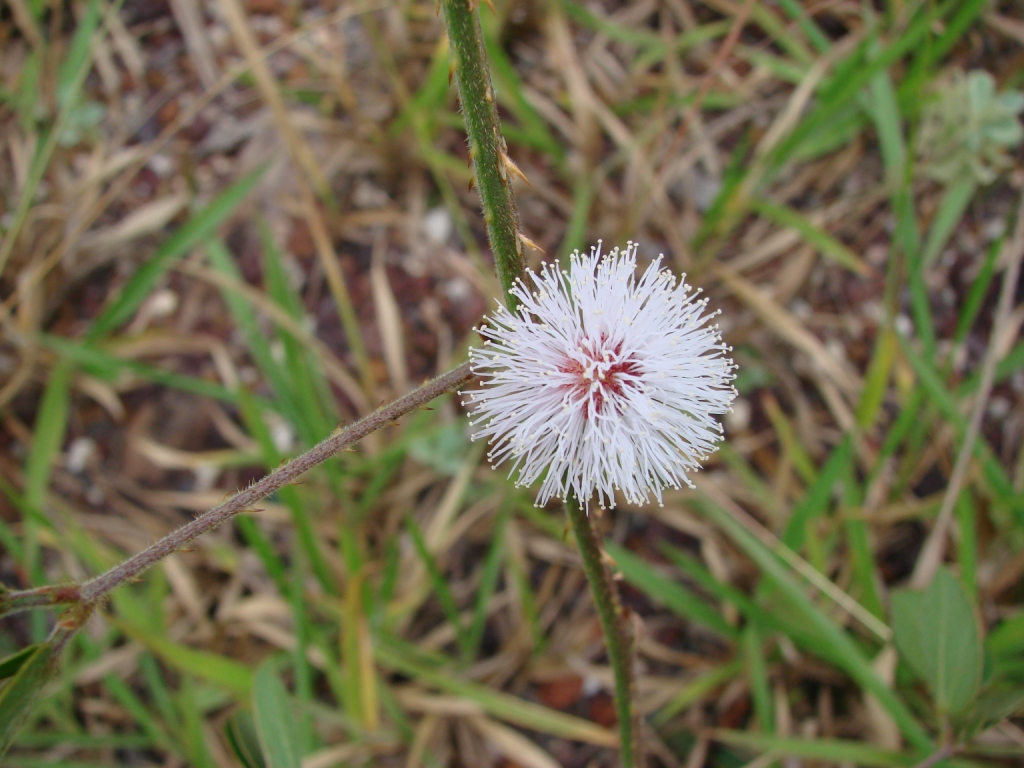 Mimosa nuda - FABACEAE Cachoeira do Tororó - Brasília - Distrito Federal - Brasil.